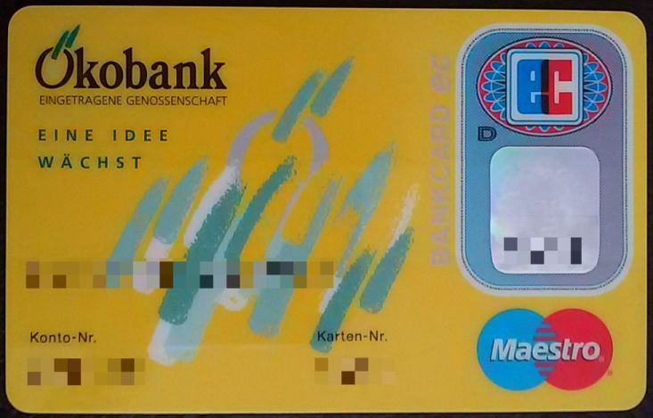 Eurocheque-Karte der Ökobank aus dem Jahr 2001